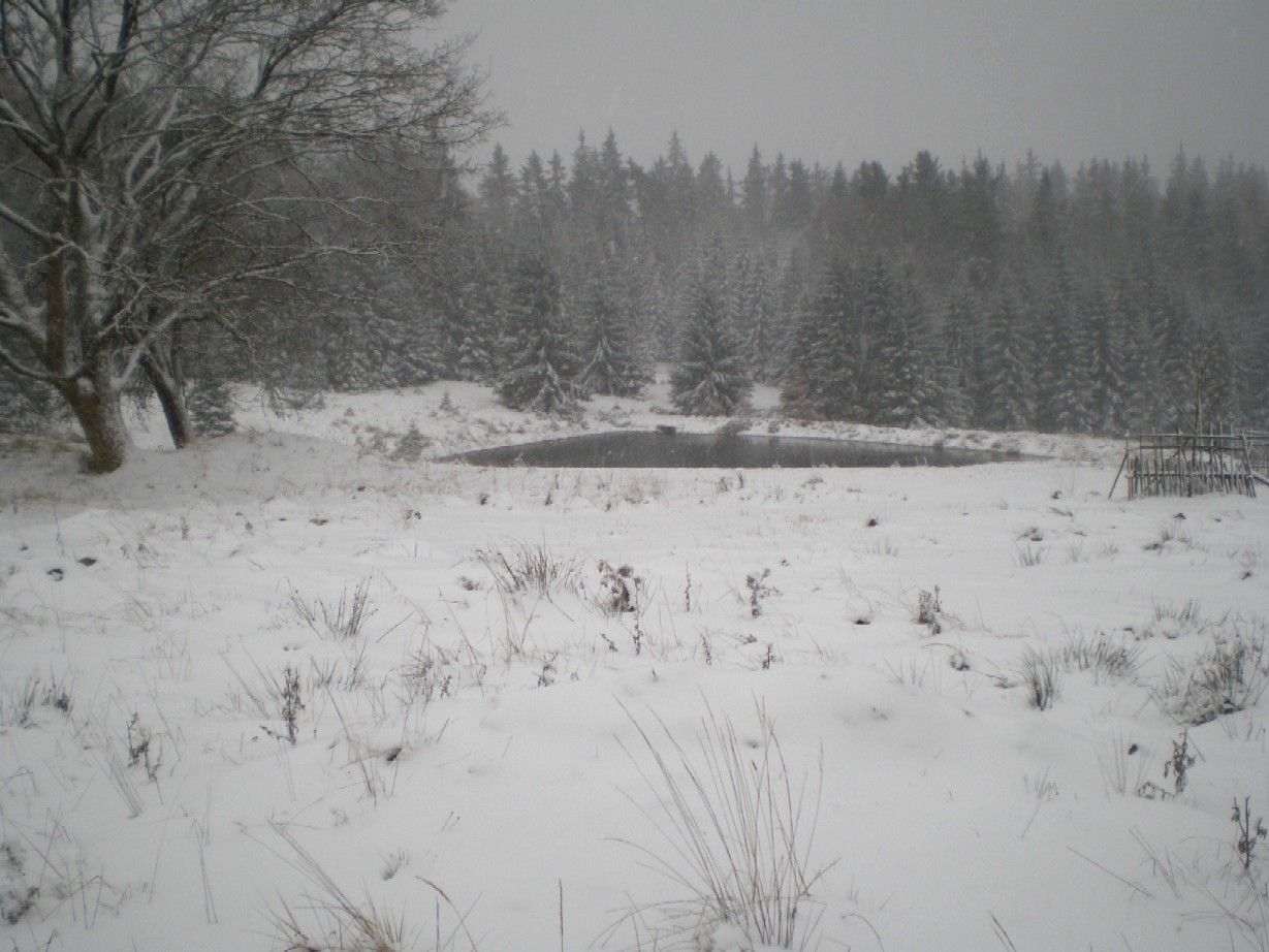 Listopadová nadílka v Brdech